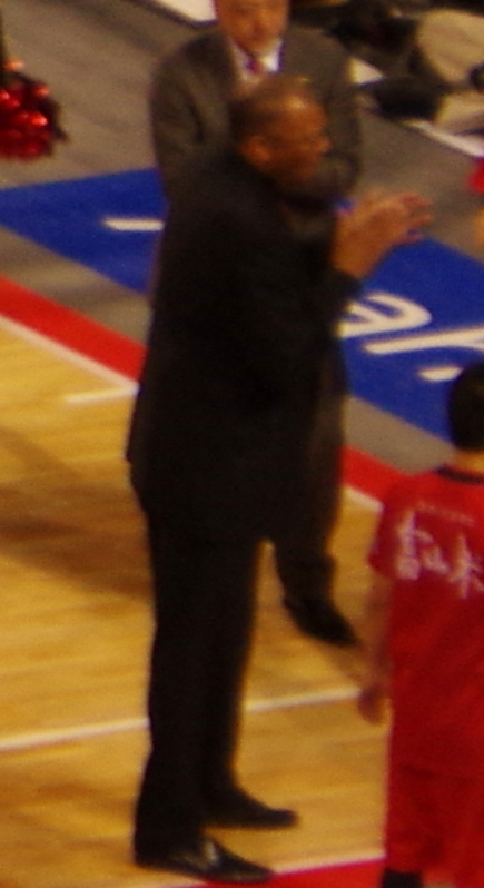 ｂｊリーグ 2013-2014シーズン プレイオフ ファイナルズ_005